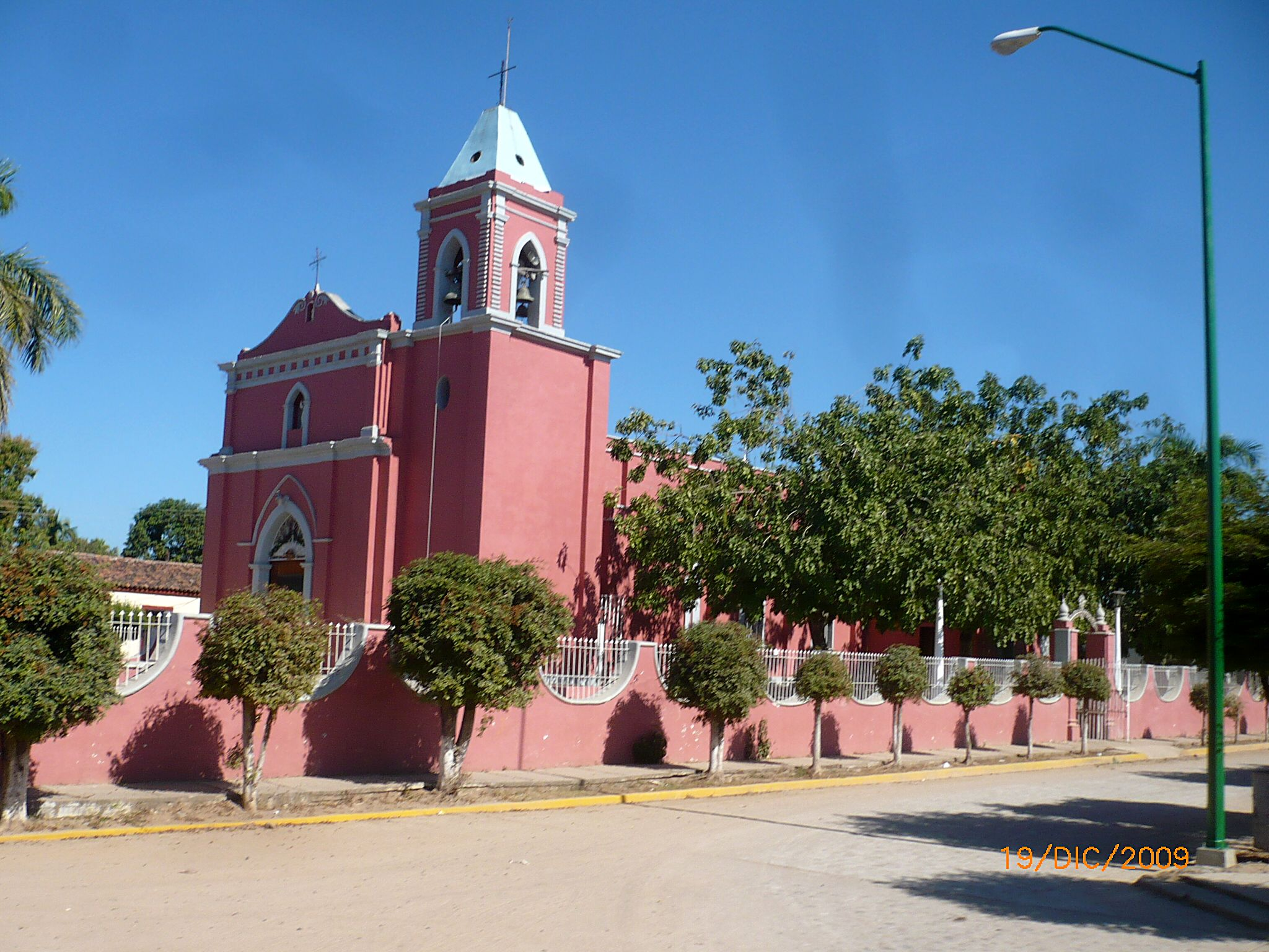 Iglesia de la Virgen de Loreto, Cacalotán, El Rosario, Sinaloa, México